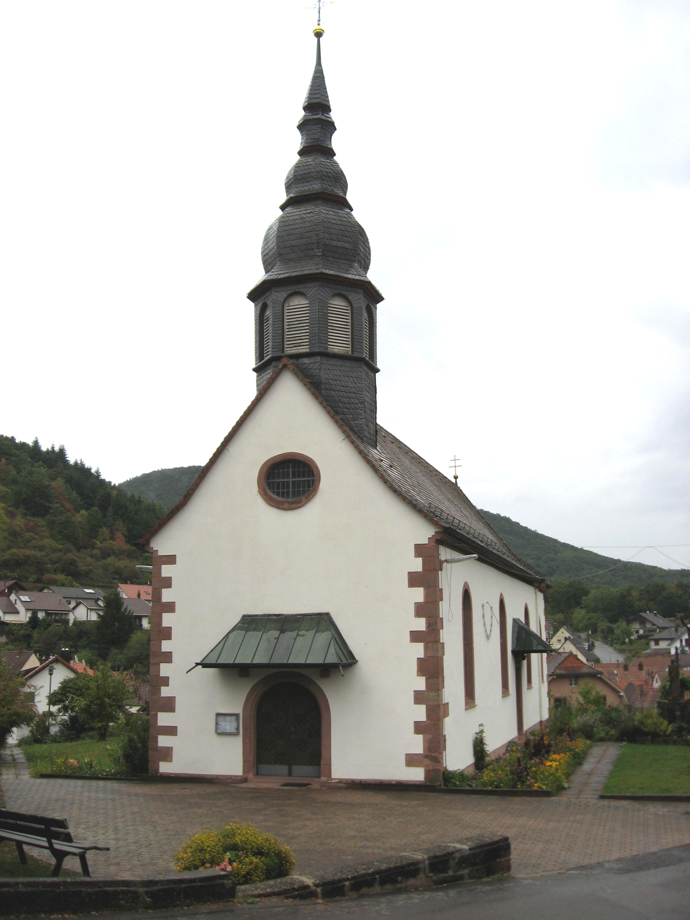 Kirche St. Wendelin in Waldhambach